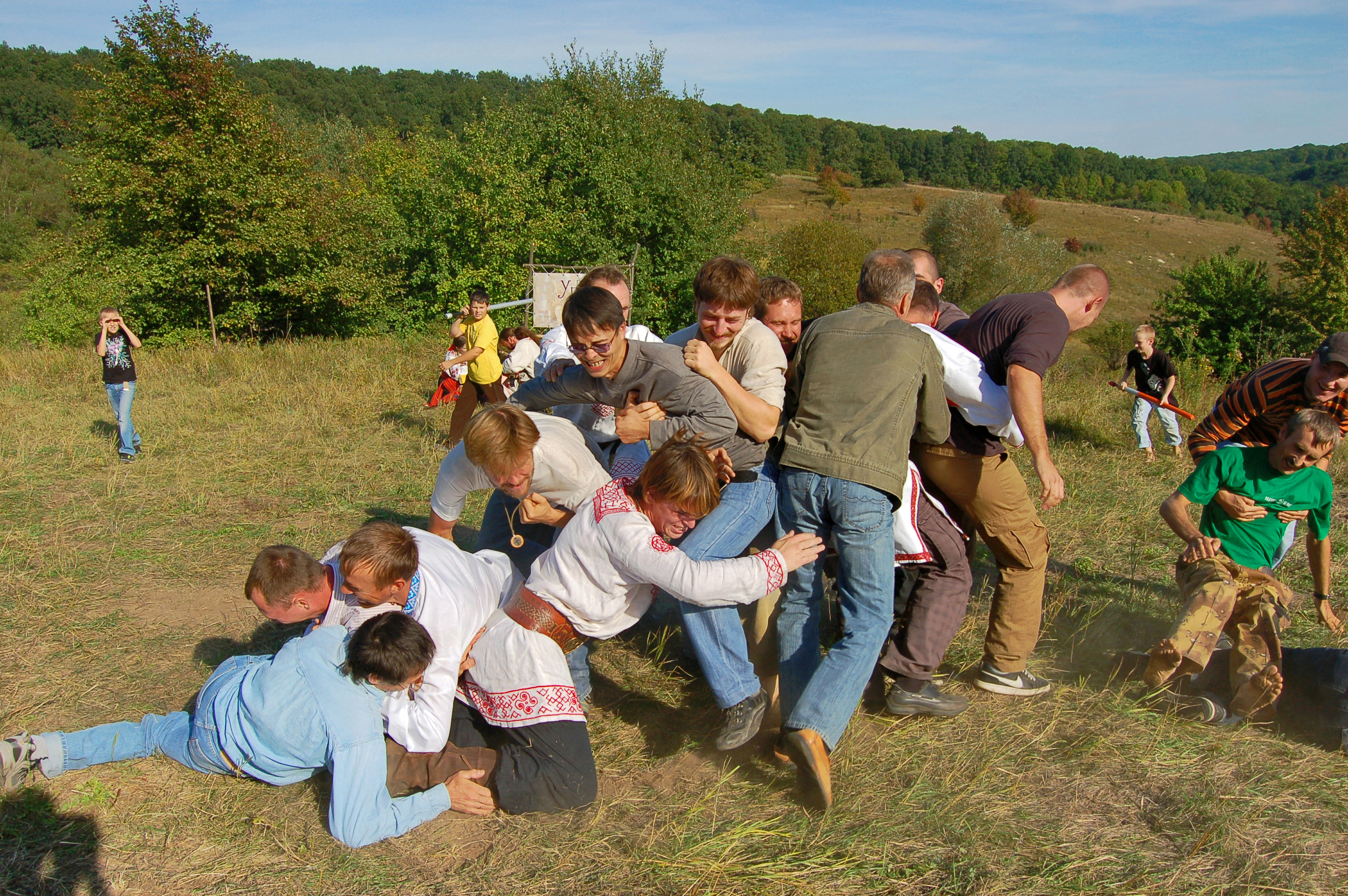 Борьба «Стенка на стенку» на празднике в родовом экопоселении «Кореньские родники». Белгородская область, 2010.